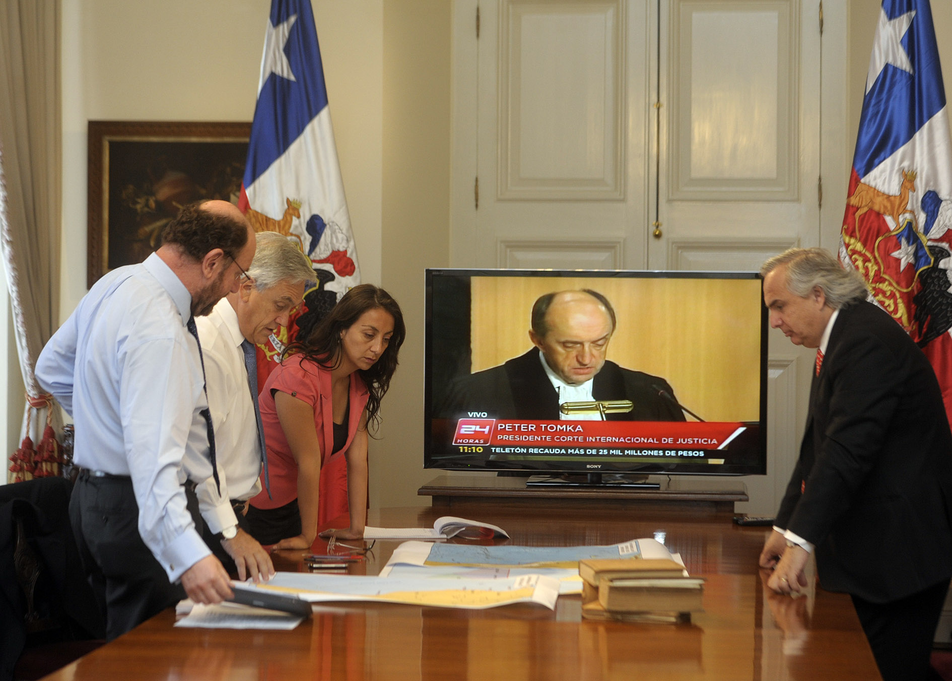 Alfredo Moreno, canciller, Sebastián Piñera, presidente de la República, Cecilia Pérez, ministra Secretaria General de Gobierno y Andrés Chadwick, ministro del Interior y Seguridad Pública, analizan los alegatos peruanos en la Corte Internacional de Justicia de La Haya.